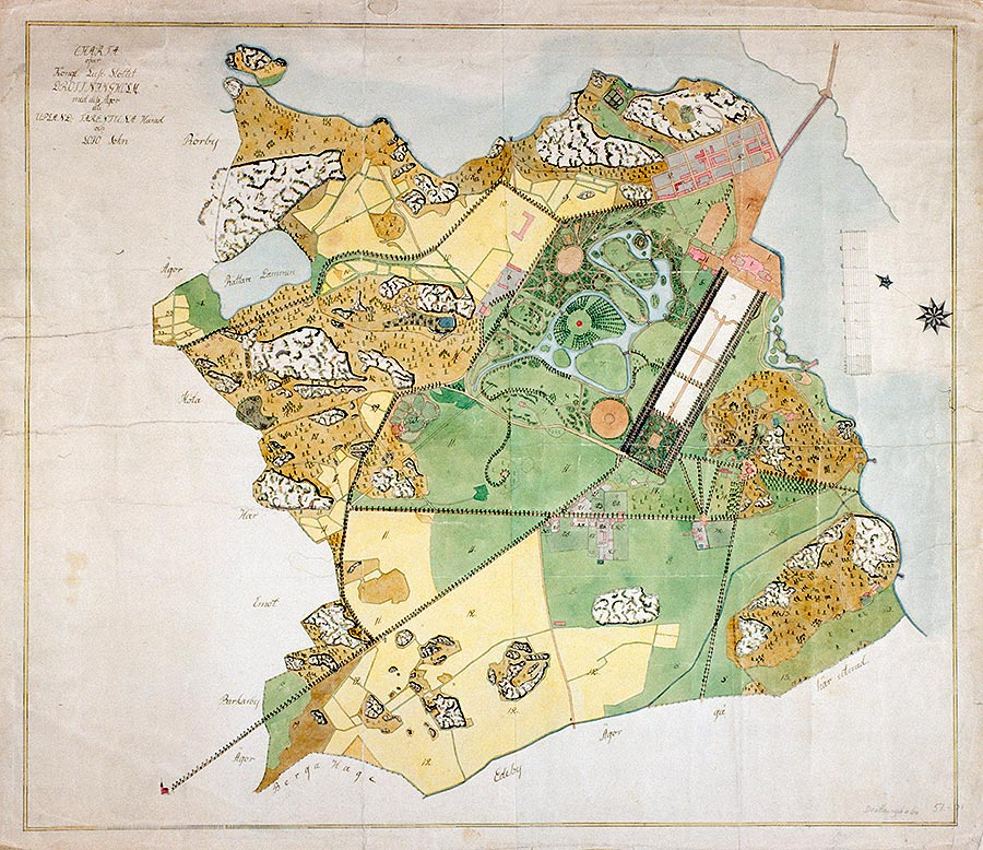 Karta över Drottningholms slottsområde, slutet av 1700-talet